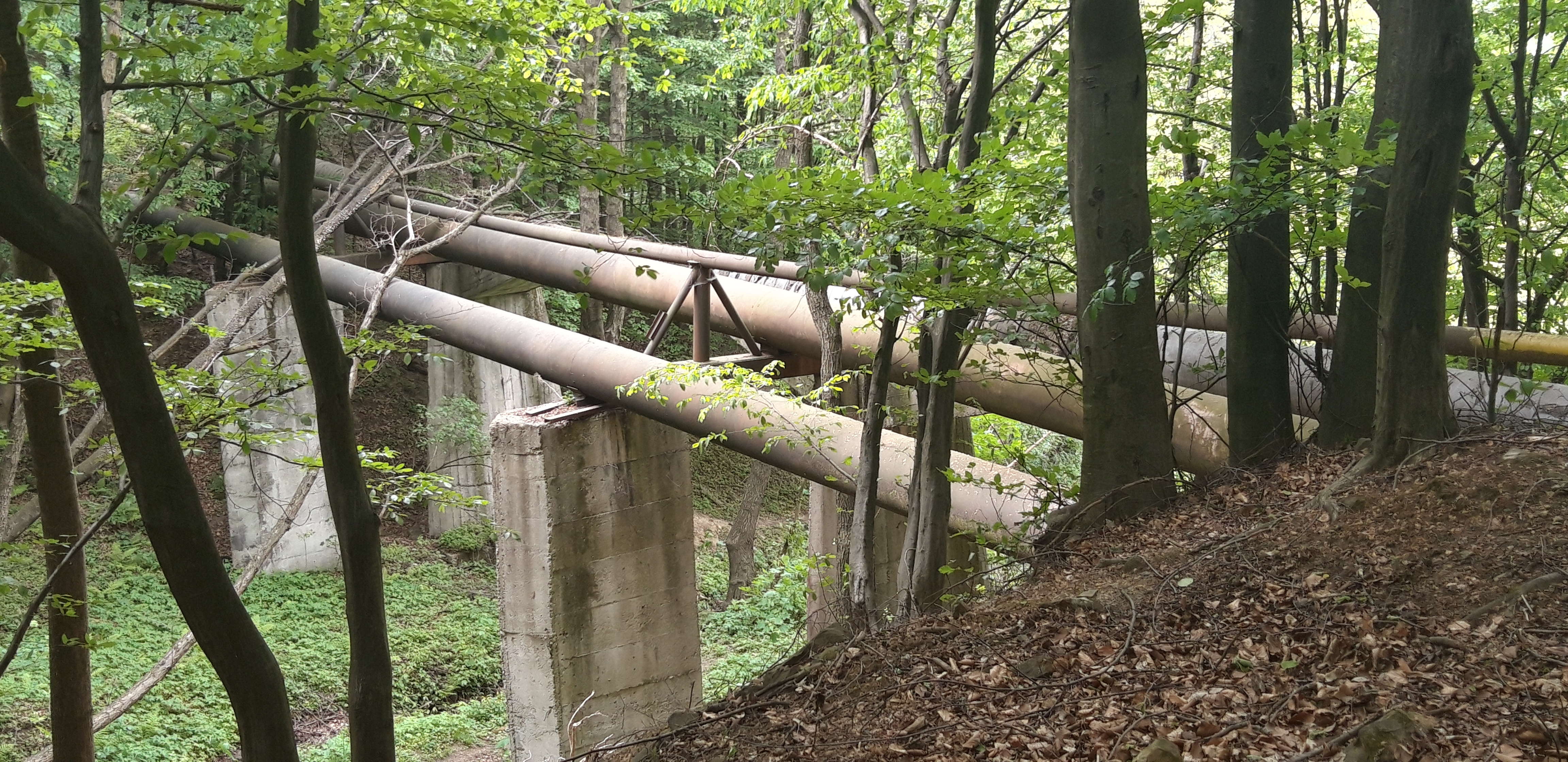 Magistrale DN 800 și 1000 mm pentru transportul apei către Târgu Ocna și Onești.